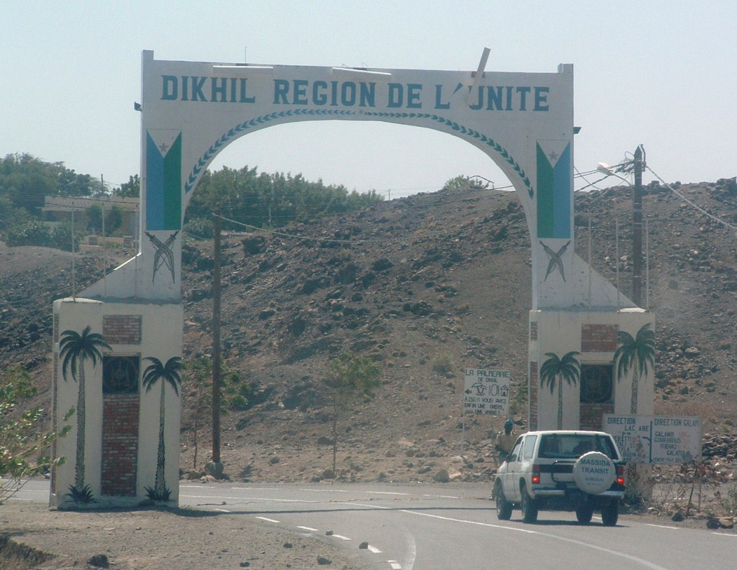 Porte d'entrée de la ville de Dikhil, Région de Dikhil, République de Djibouti.